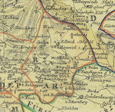 Charte vom Königreich Westphalen 1811: Kartenausschnitt District Nordhausen